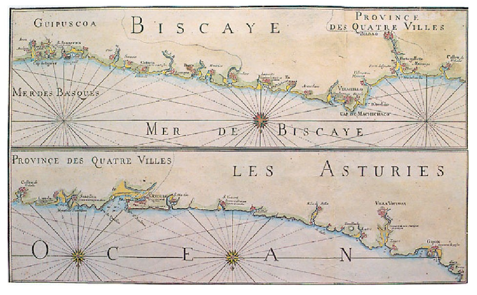 “Carte de la côte septentrionale d’Espagne”. Chez Ian van Creulen, 1695. Holandar jatorriko itsas kartografia. Holandarrak, ingelesekin batera, nagusi ziren mapagintza-mota horretan. (Argazkia: J. G. Bilduma: J.R. S.).